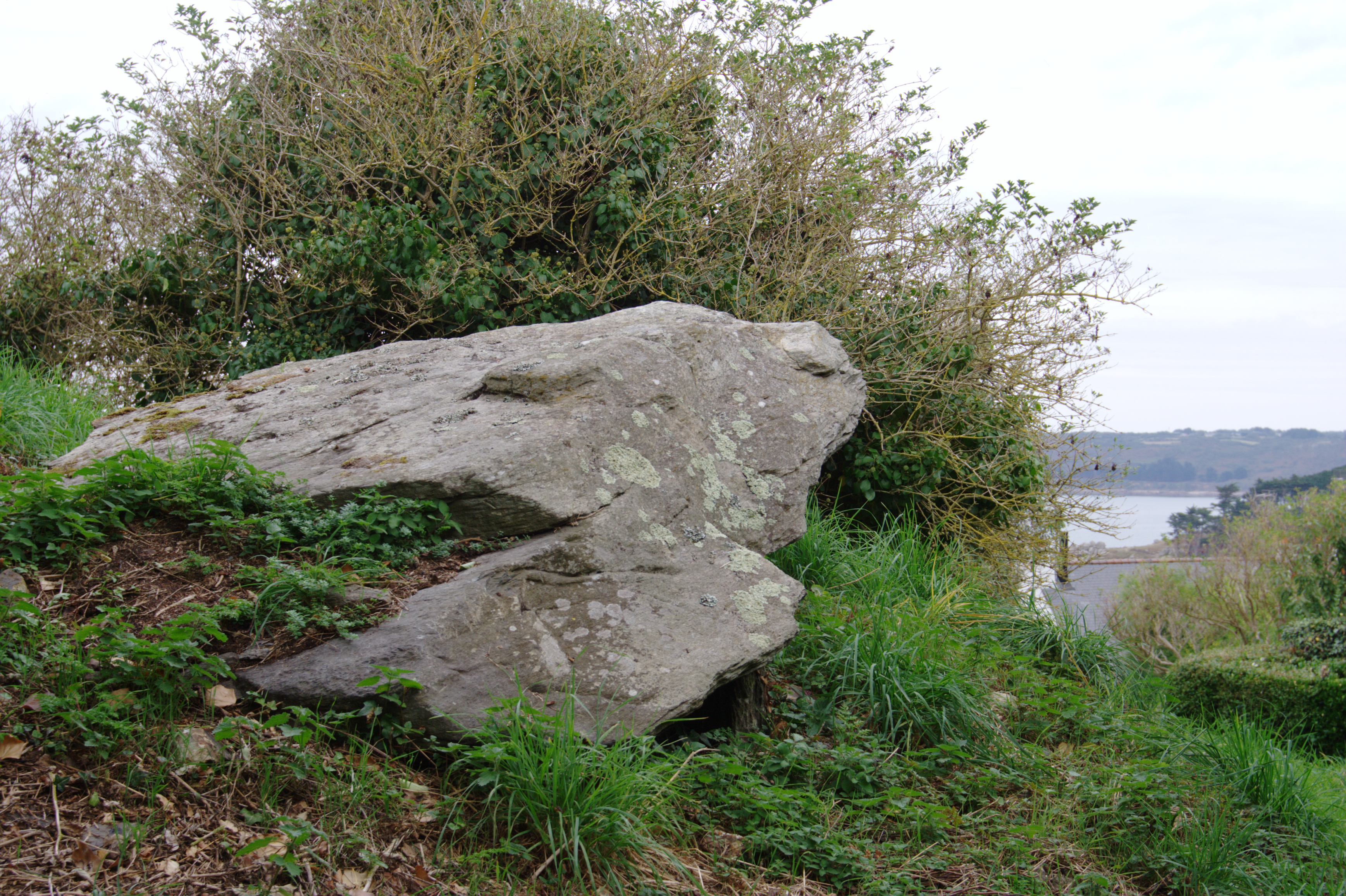 Karn Roskoualc'h e Tredraezh-Lokemo.